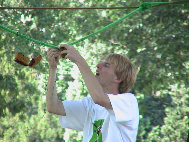 Joost prepareert een koekhapdraad.